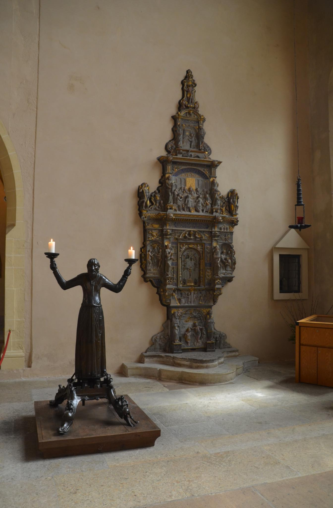 Romanischer Leuchter "Wolfram" (Magdeburg, 2. Hälfte 12. Jahrhundert), Dom, Erfurt, Thüringen, Deutschland. Erfurt Impressionen.